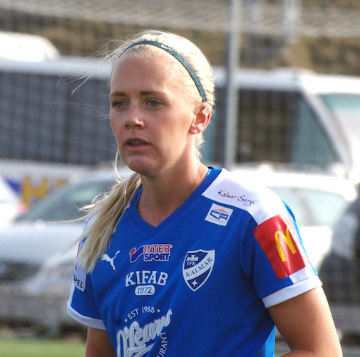 Elsa Karlsson under match på Gasten i Kalmar